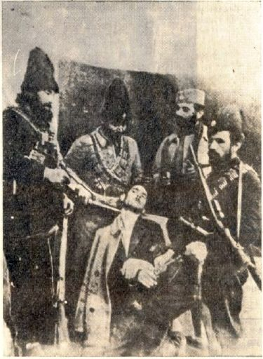 Srpskohrvatski / српскохрватски: Četnici kolju zarobljenika.